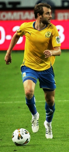 Роман Славнов в составе «Луча-Энергии»